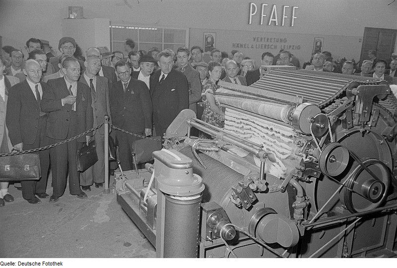 Original image description from the Deutsche Fotothek Besucher bei der Vorführung einer Textilmaschine der Firma Pfaff auf der Technischen Messe 1953